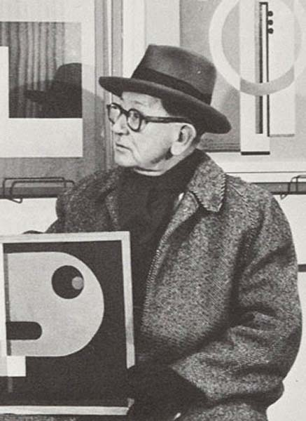 Gösta Adrian-Nilsson (1884-1965)